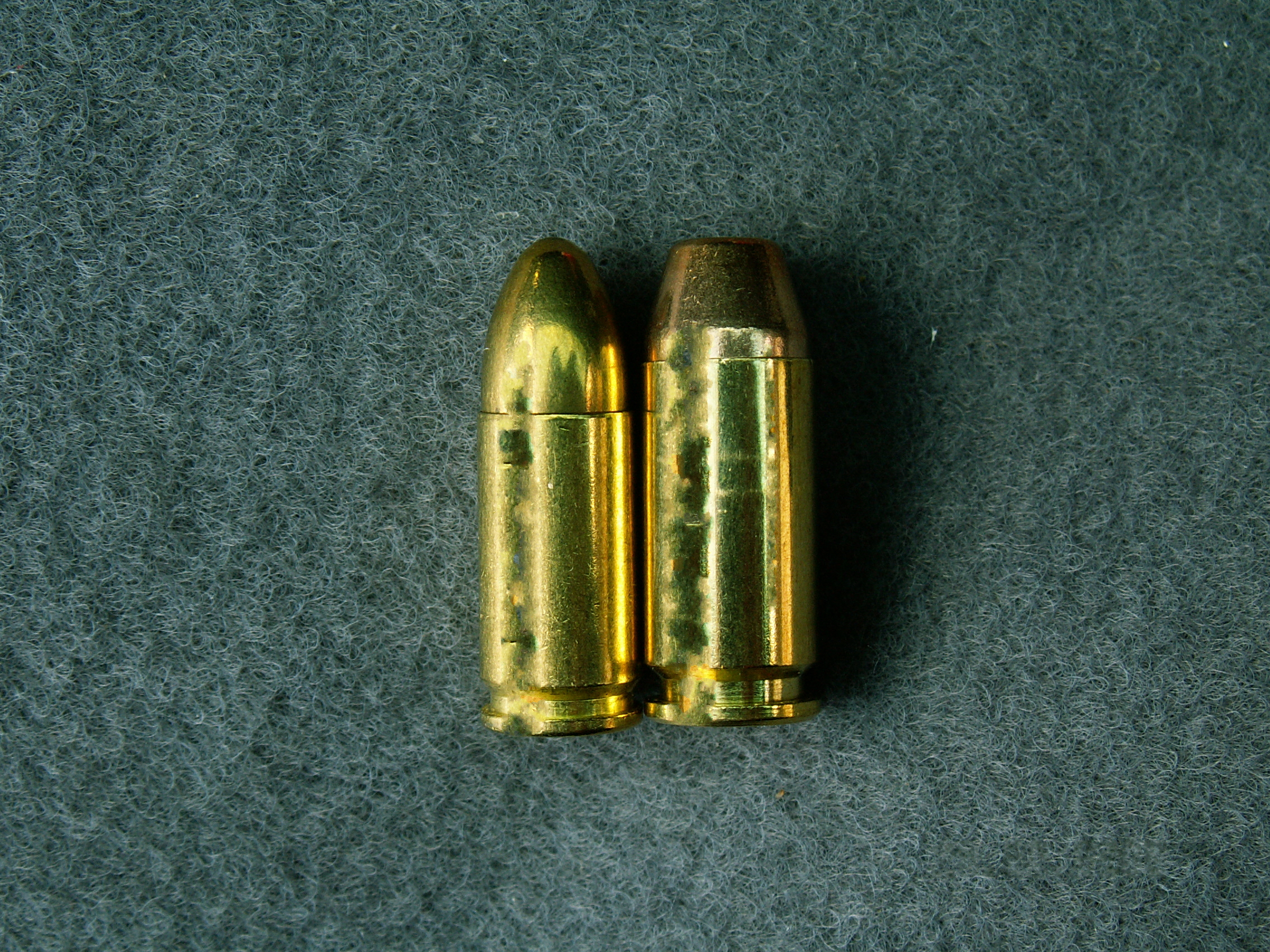 Naboja 9x19 (norinco) in .40 s&w (selier&belot).